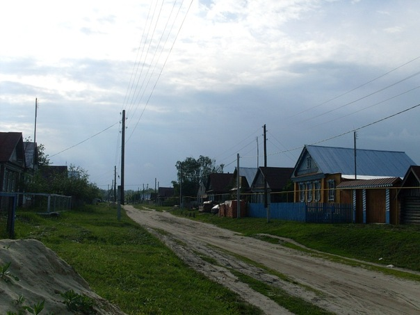 Тойси-Паразуси летом